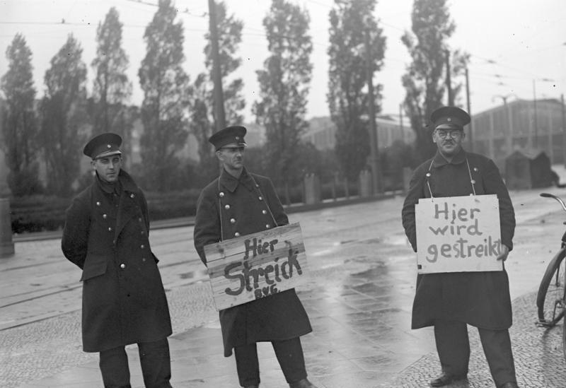 Der grosse Verkehrsstreik der Strassenbahn, Untergrundbahn und Autobusse in Berlin ! Streikposten der Strassenbahner vor dem grossen Zentral-Strassenbahnhof in der Müllerstrasse in Berlin.